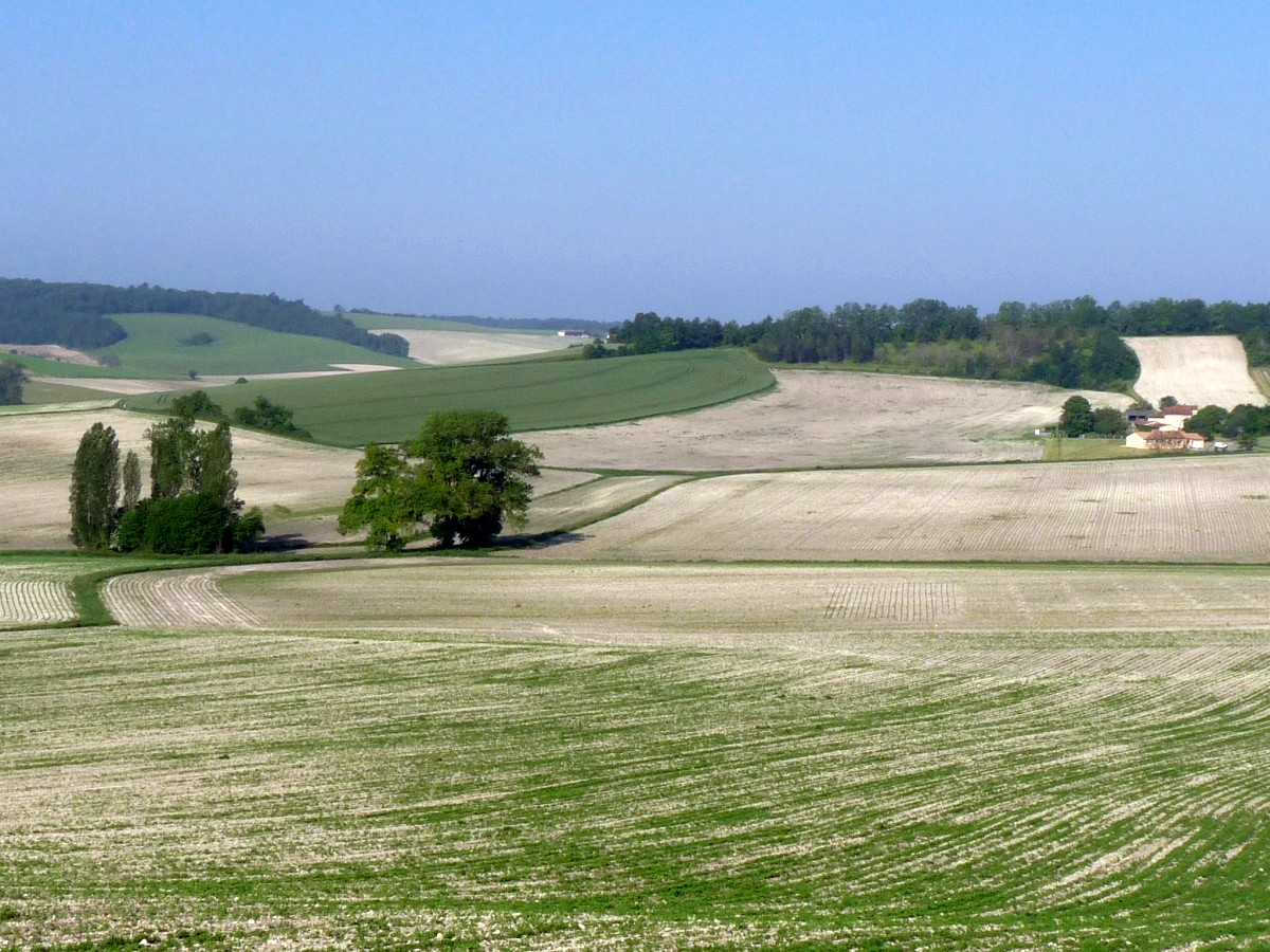 Vue au sud de St-Félix (Charente, France) depuis la D.20; vue vers l'ouest